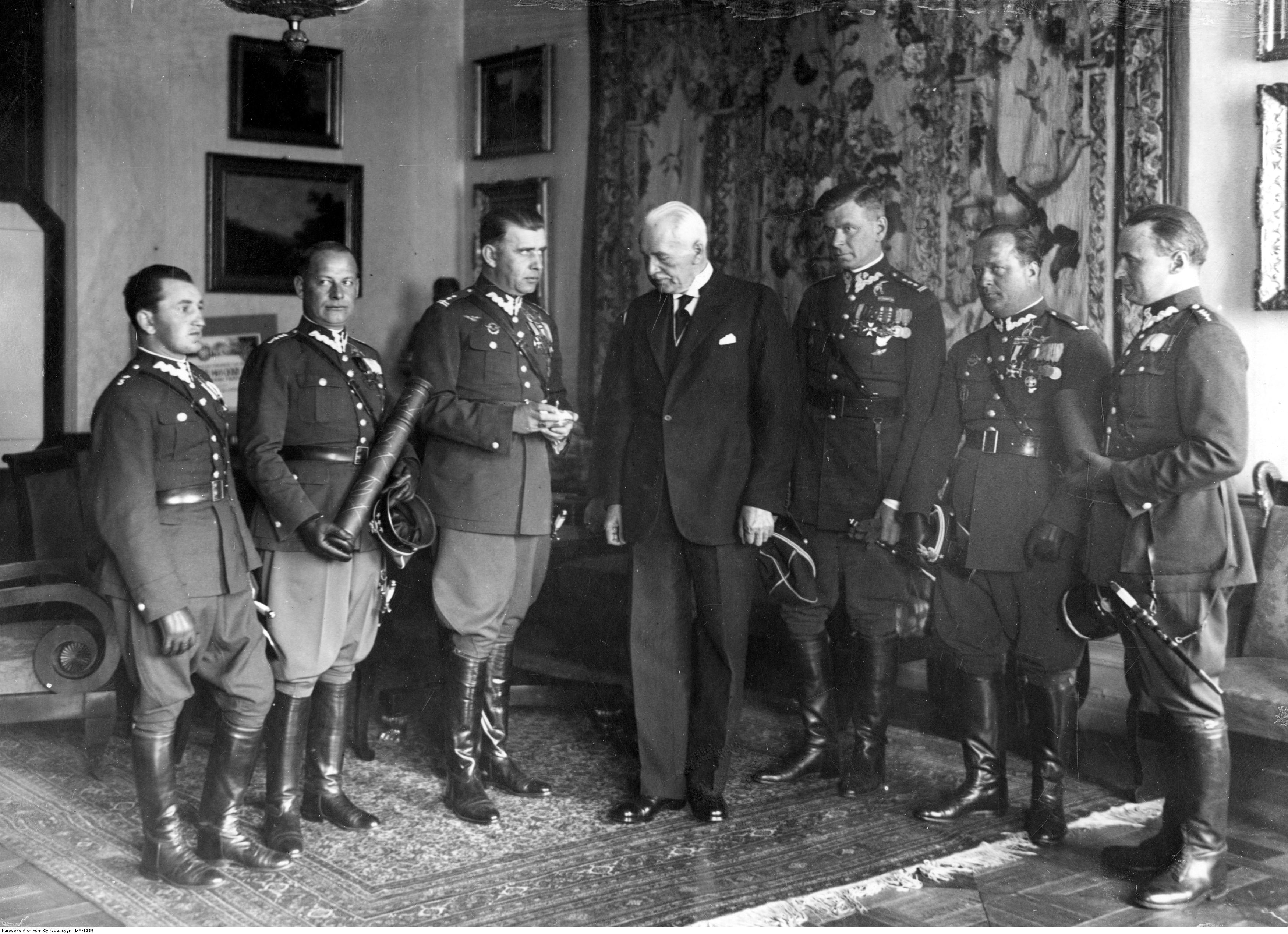 Delegacja 3 Pułku Lotniczego na audiencji u prezydenta RP Ignacego Mościckiego - wręczenie Prezydentowi odznaki pułkowej. Widoczny m.in. pułkownik Ludomił Rayski (trzeci z prawej). Koncern Ilustrowany Kurier Codzienny - Archiwum Ilustracji. Sygnatura: 1-A-1389